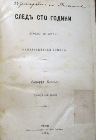 Беллами, Едуардъ (1892) Следъ сто години, Руссе: Скоро-печатница Спиро Гулабчевъ